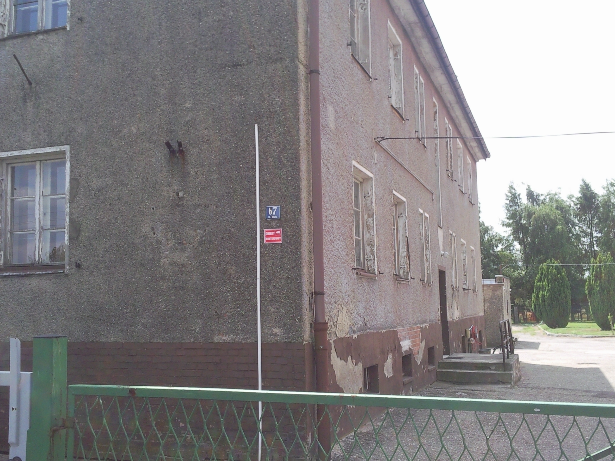 Chałupki, dawna Strażnica Wojsk Ochrony Pogranicza i Straży Granicznej w Chałupkach – budynek nr 2 (koszarowy)